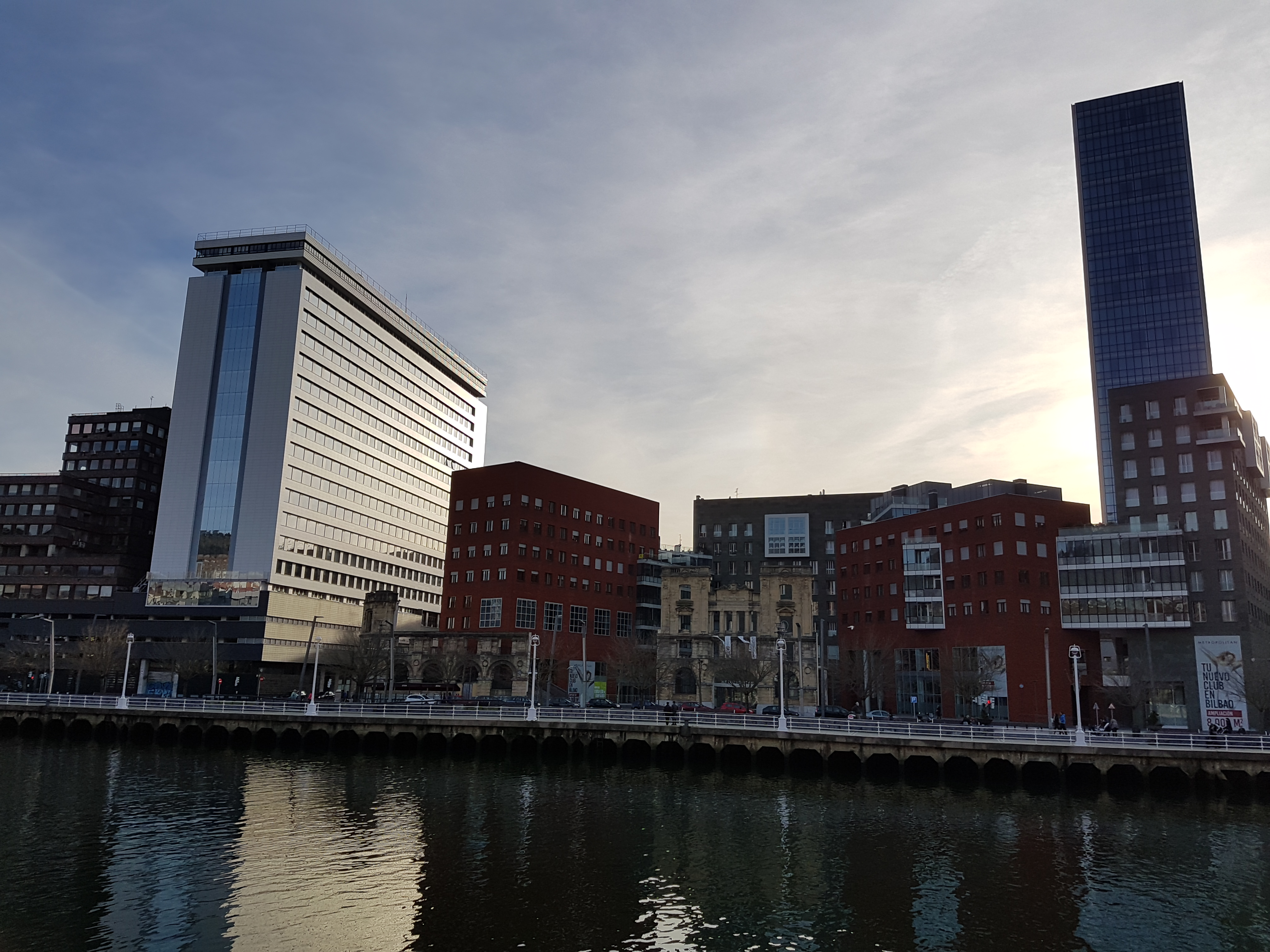 Edificio Albia remodelado.